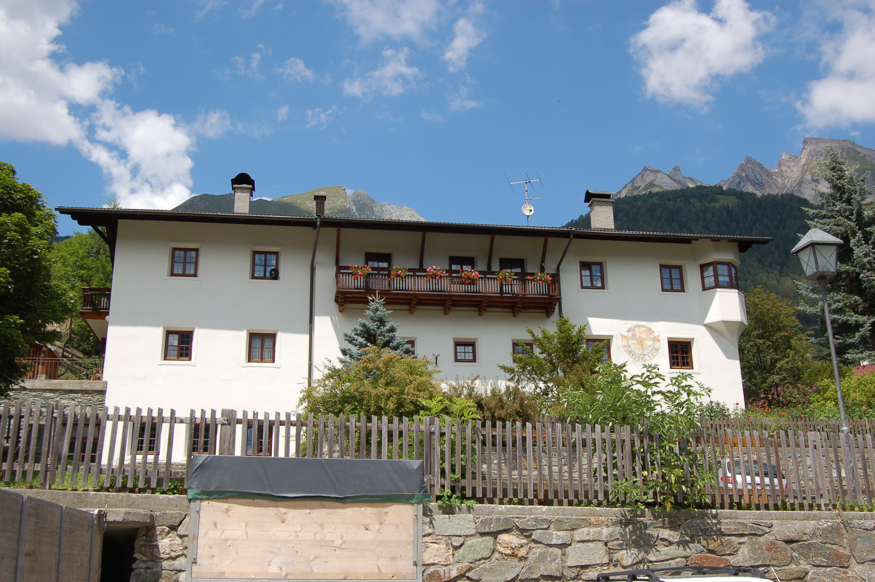 Der denkmalgeschützte Pfarrhof in Virgen in Osttirol.